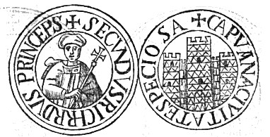 Richard II z Capuy